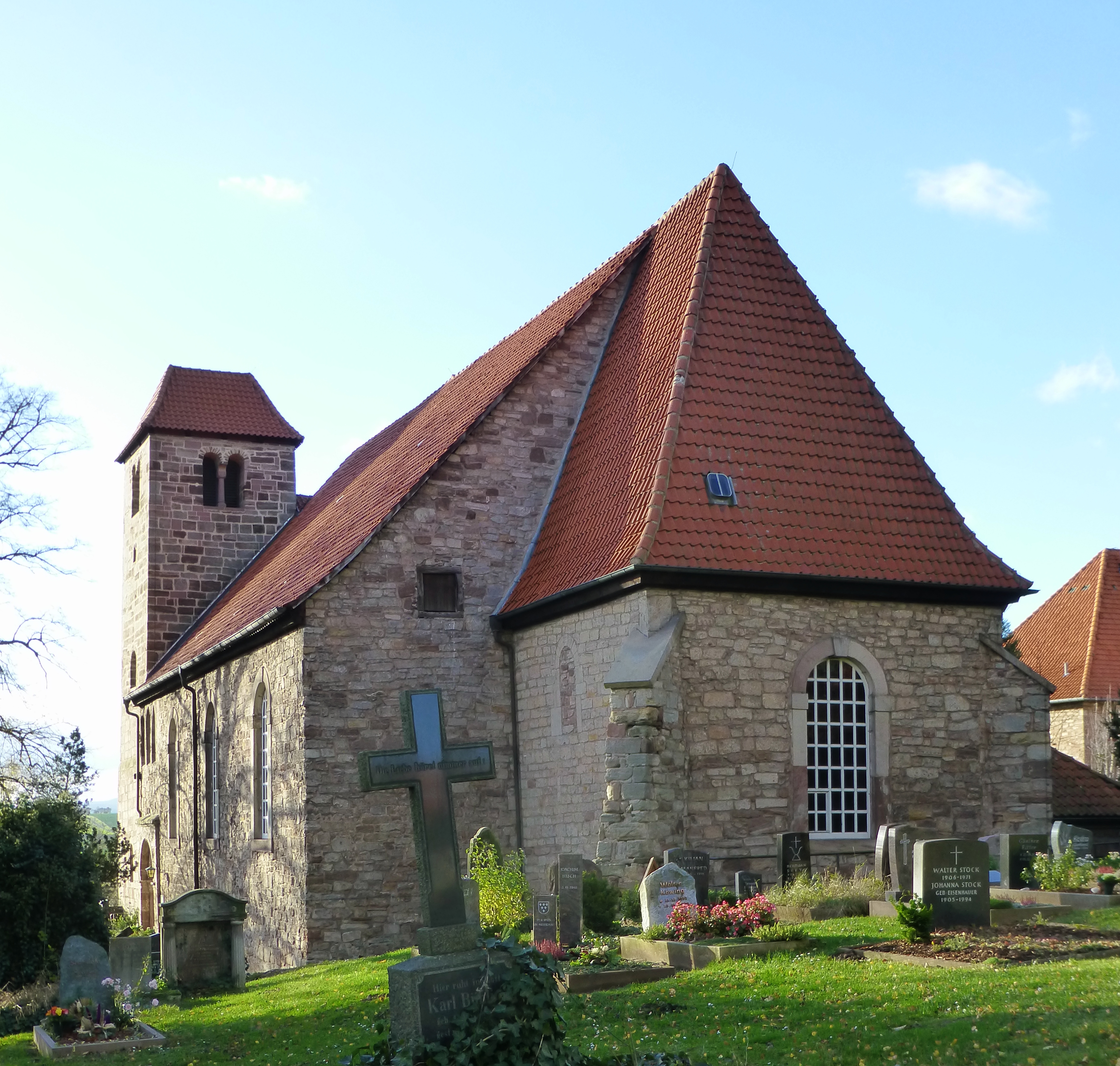 Südostansicht der ehemaligen Klosterkirche St. Christophorus in Reinhausen, Gemeinde Gleichen, Südniedersachsen